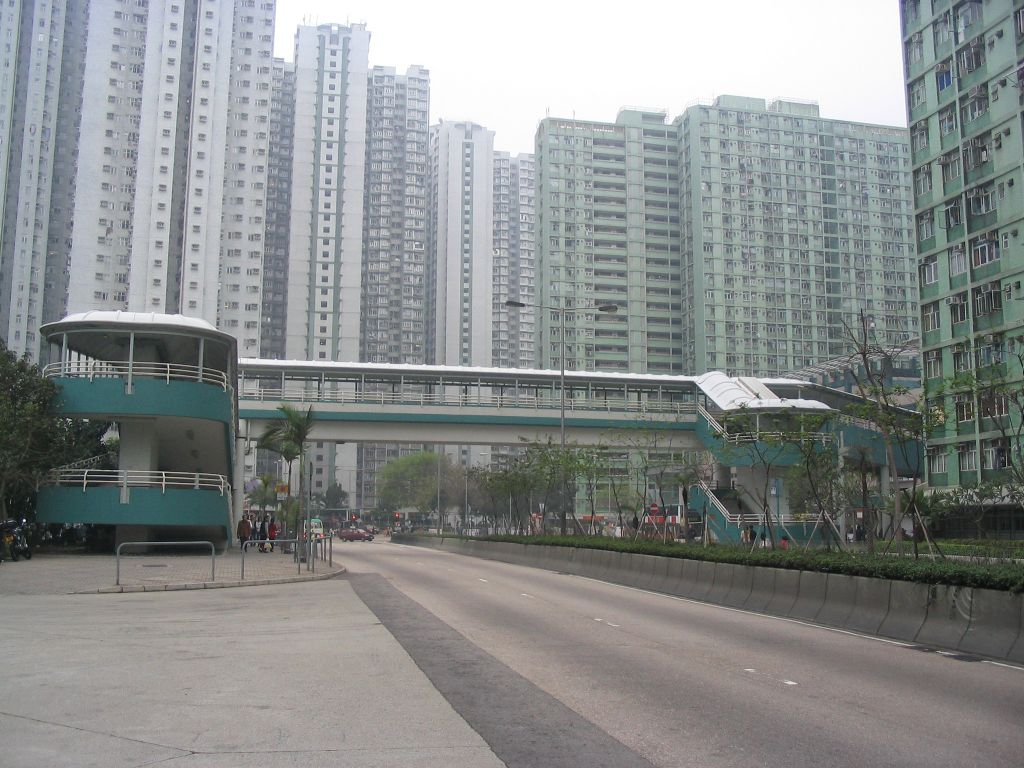 小西灣道及小西灣邨(右) Siu Sai Wan Road & Siu Sai Wan Estate (right)